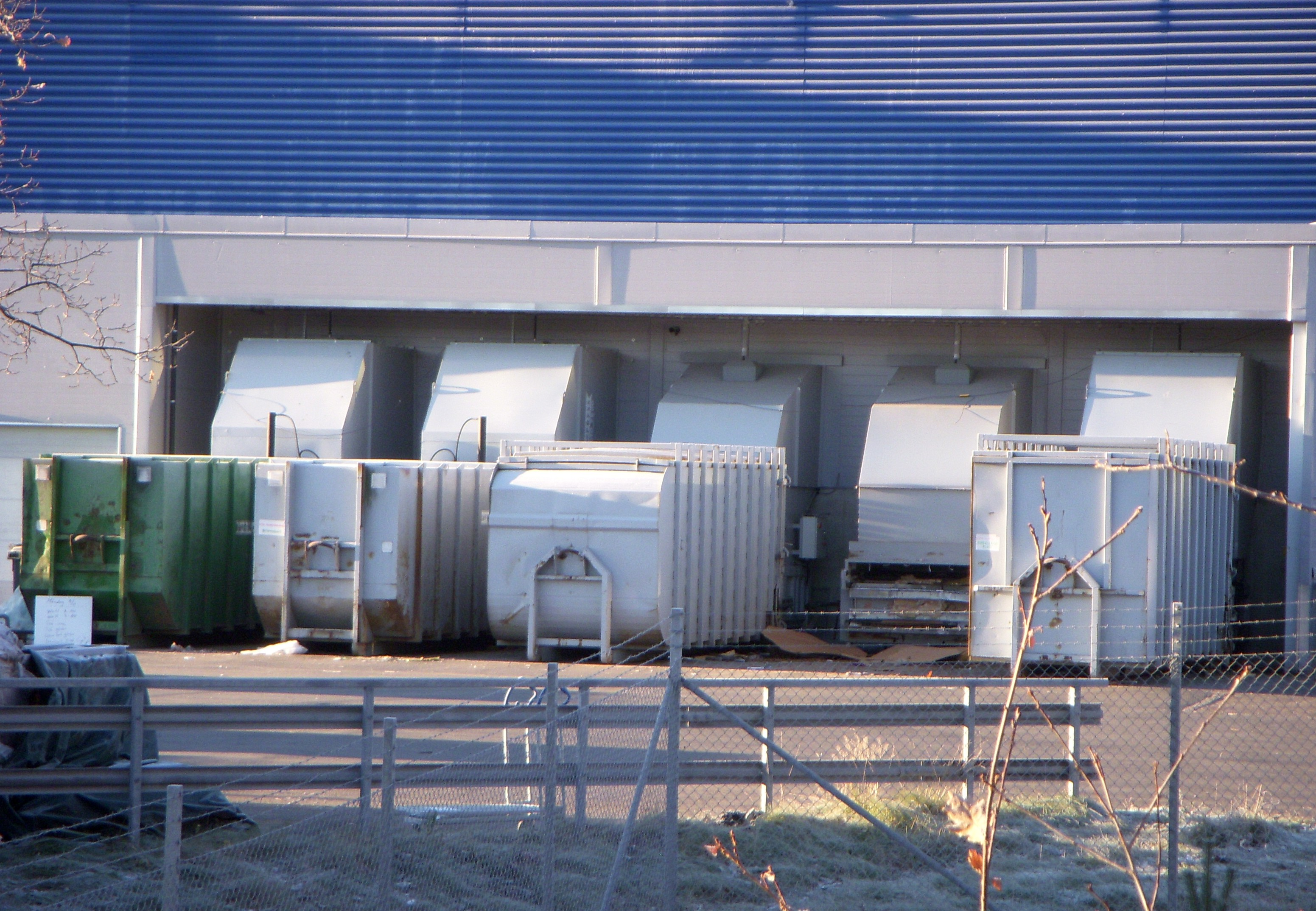 Sopcontainer och sopkomprimatorer vid IKEA Kungens kurva